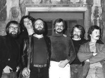 v.l. Pudi Lehmann, Claudio Bischoff, Marc Hellman, Willy Müller, Tinu Heiniger, Marc Küng